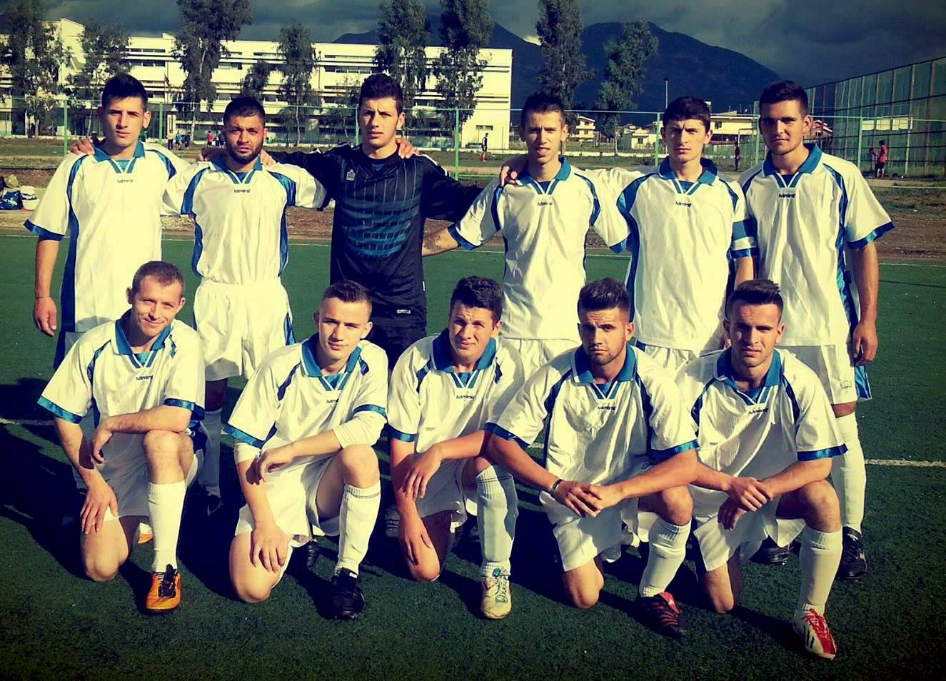 Drini FK 2004